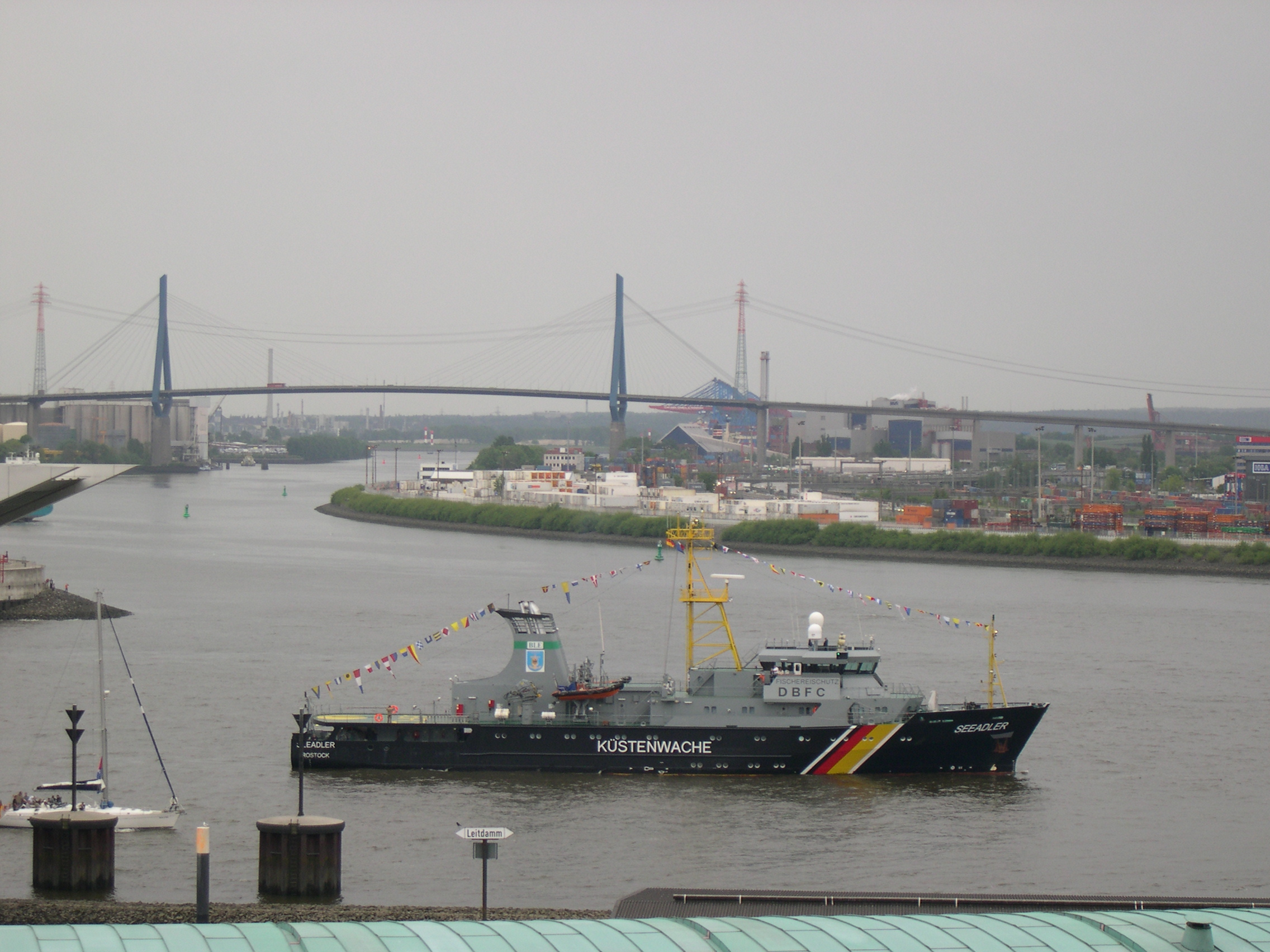 Das Fischereischutzboot "Seeadler" der Deutschen Küstenwache im Hamburger Hafen während des Hafengeburtstags 2007. IMO number : 9191541 Call Sign : DBFC Gross tonnage : 1774 Year of build : 2000Hafengeburtstag Köhlbrandbrücke Küstenwache